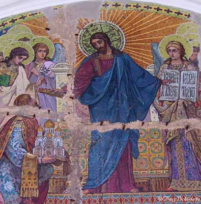 Фрагмент мозаики «Христос с донатором» в Покровском соборе в Барановичах.